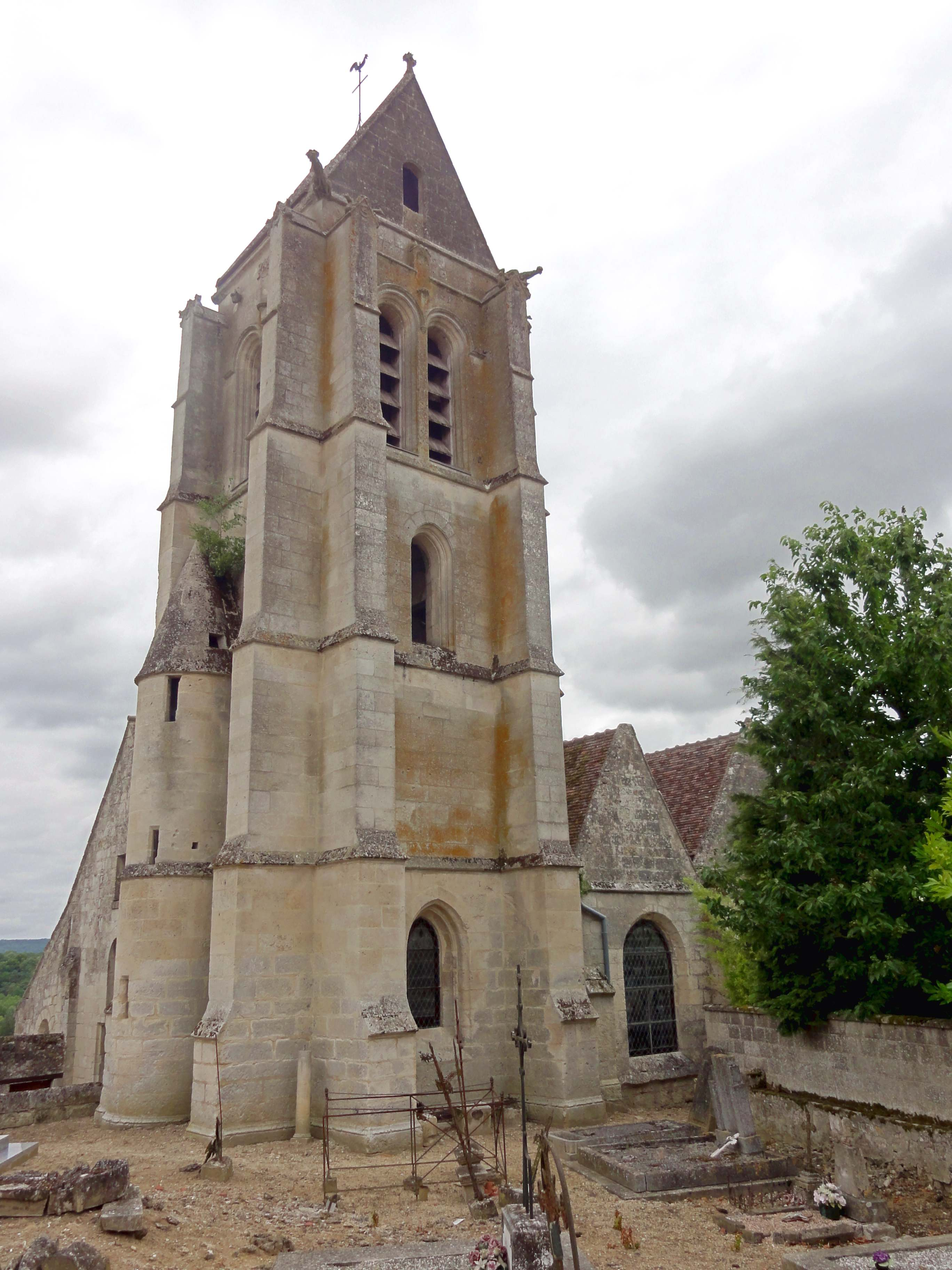 Église Saint-Laurent de Russy-Bémont (voir titre).